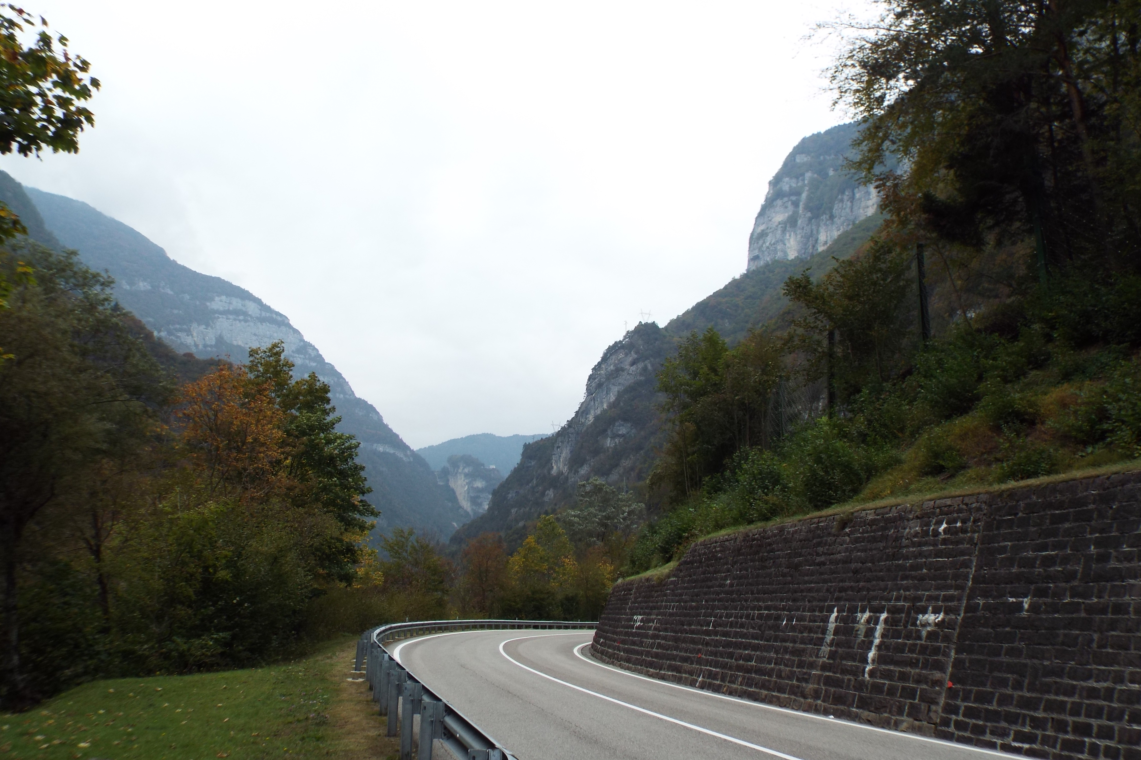 Un tratto della Val Schener